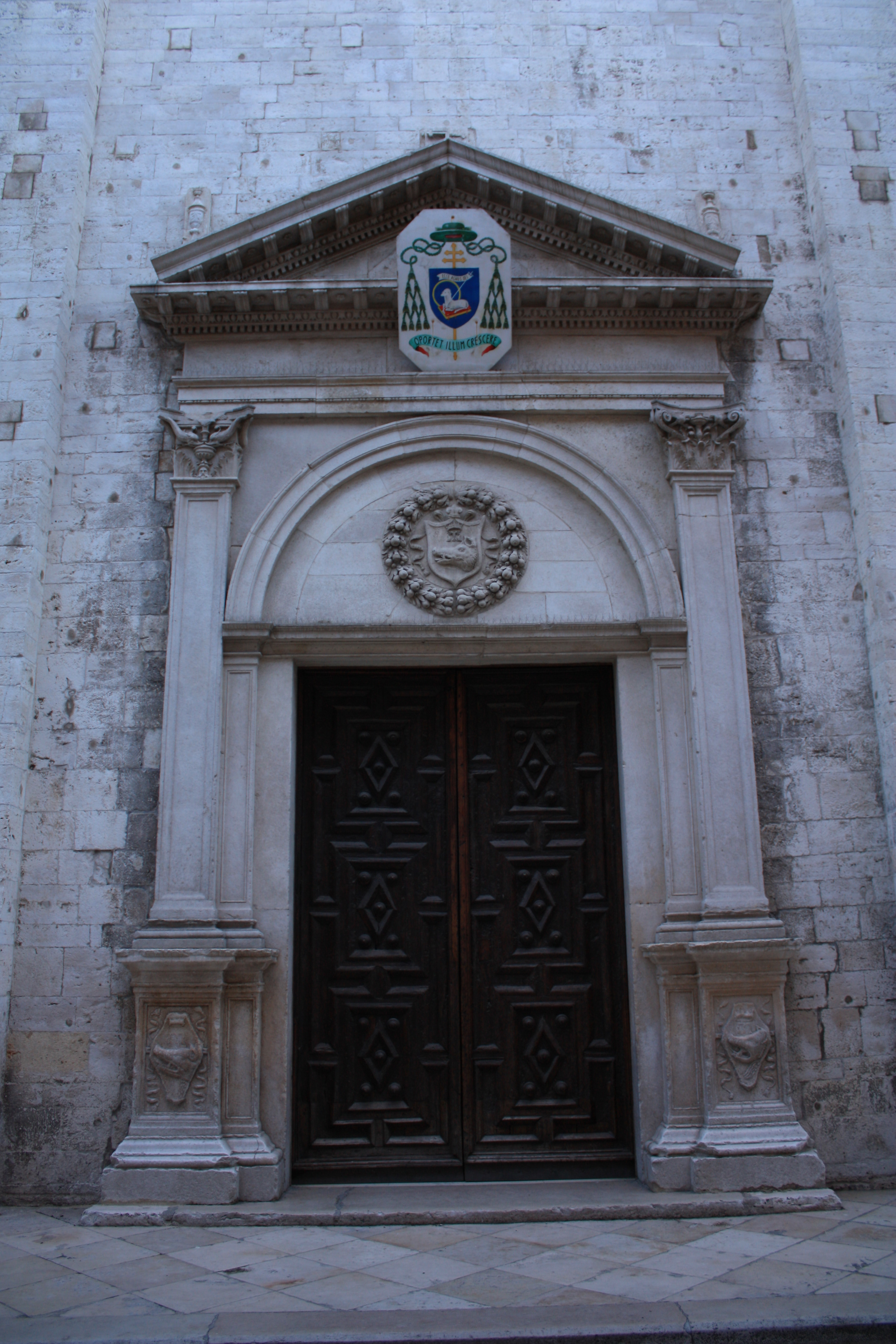 Barletta: Cattedrale Santa Maria Maggiore - Portale d'ingresso principale